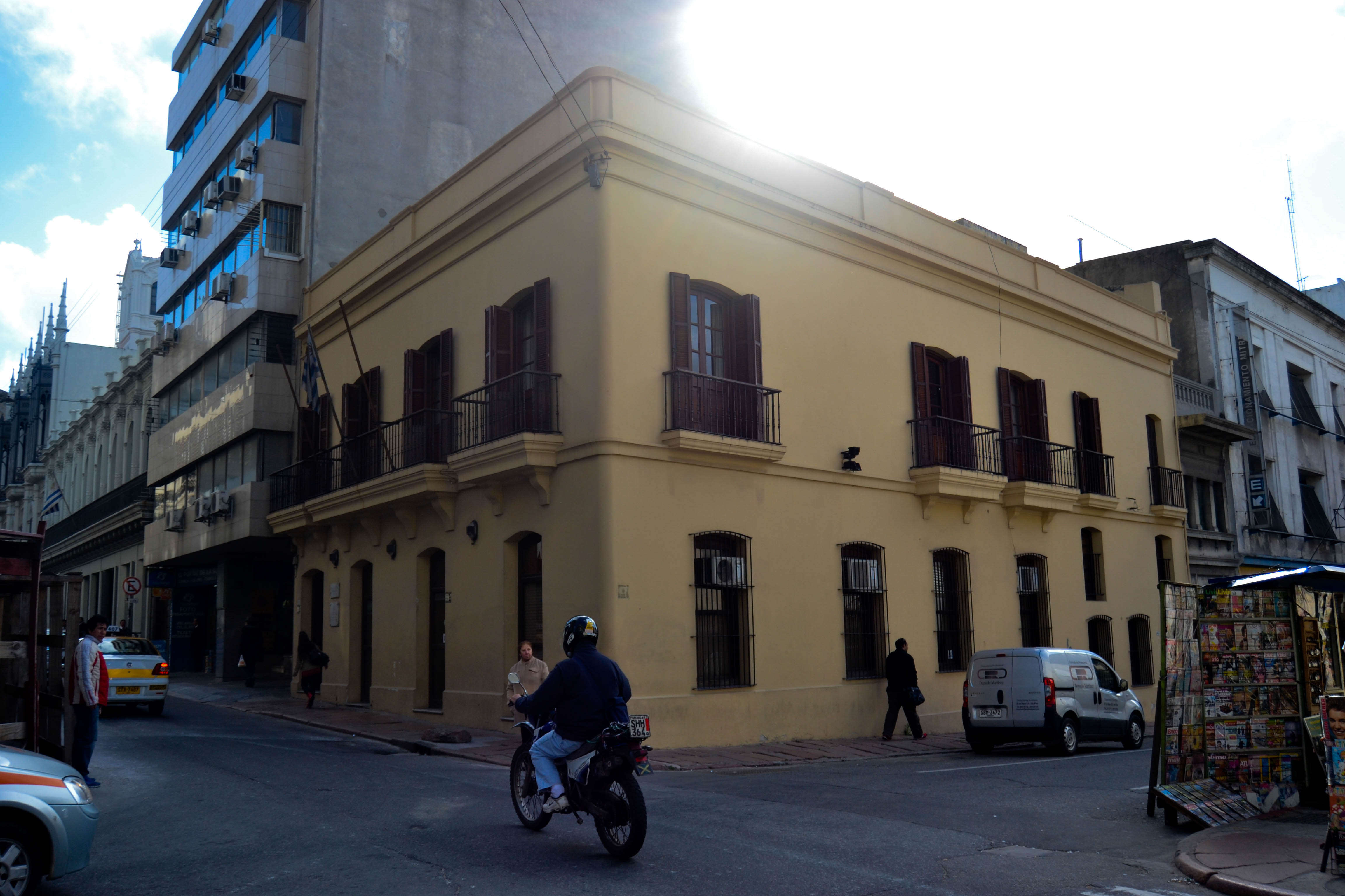 Casa del Gral. Manuel Oribe - Sede de la Comisión del Patrimonio Cultural de la Nación. Ubicada en el departamento de Montevideo